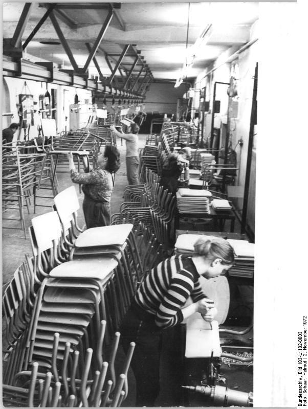 Mansfeld, Stuhlfabrik, Werkhalle ADN-ZB Schaar 2-11-72-Bau Bez. Halle: Konsumgüter aus dem Mansfeldkombinat- Stahlrohrmöbel - vorwiegend Stühle und Schulmöbel - stellen etwa 300 Beschäftigte des VEB Mansfeldkombinats als Konsumgüter in ihrem Betrieb her. Täglich verlassen 2400 Stühle das Werk.